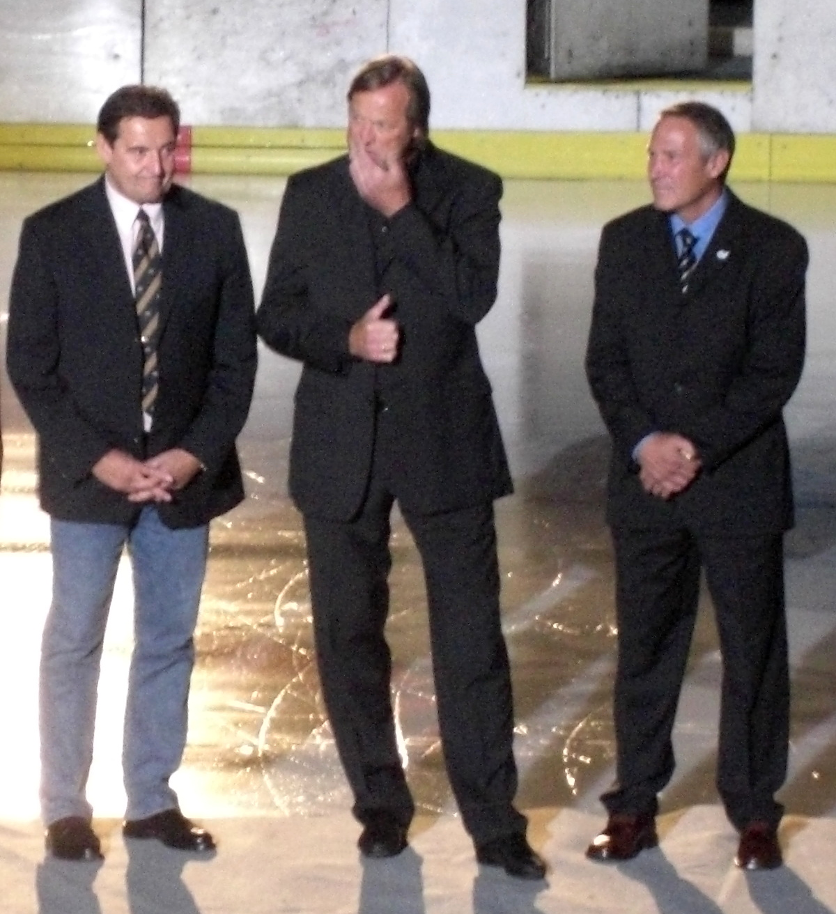 Klaus Auhuber, Erich Kühnhackl, Alois Schloder bei der Ehrung der herausragendsten Spieler des EV Landshut bei der Saisoneröffnung 2010/11 gegen Kaufbeuren.